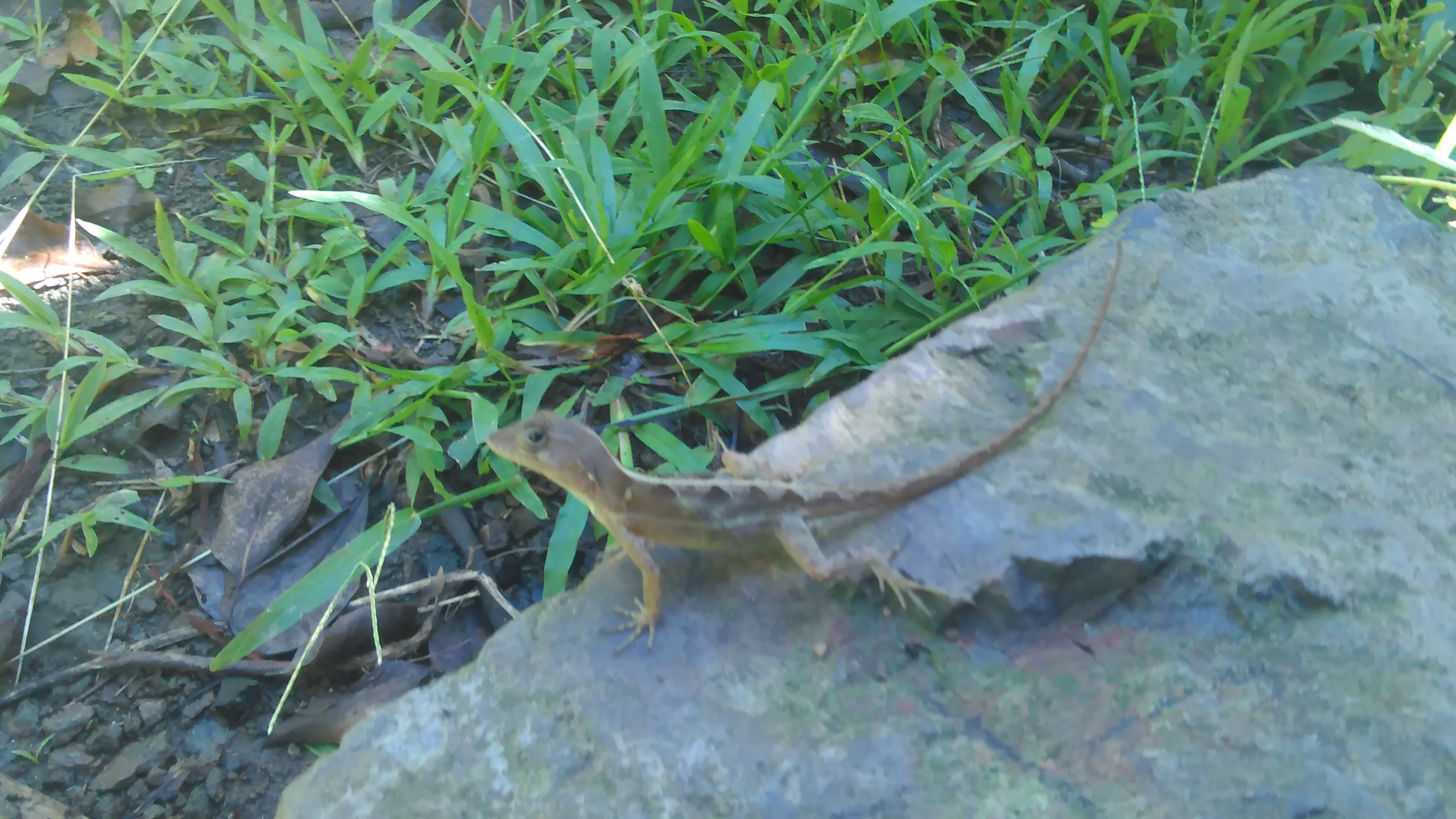 Kreyòl ayisyen : Sa se foto yon zandolit gri